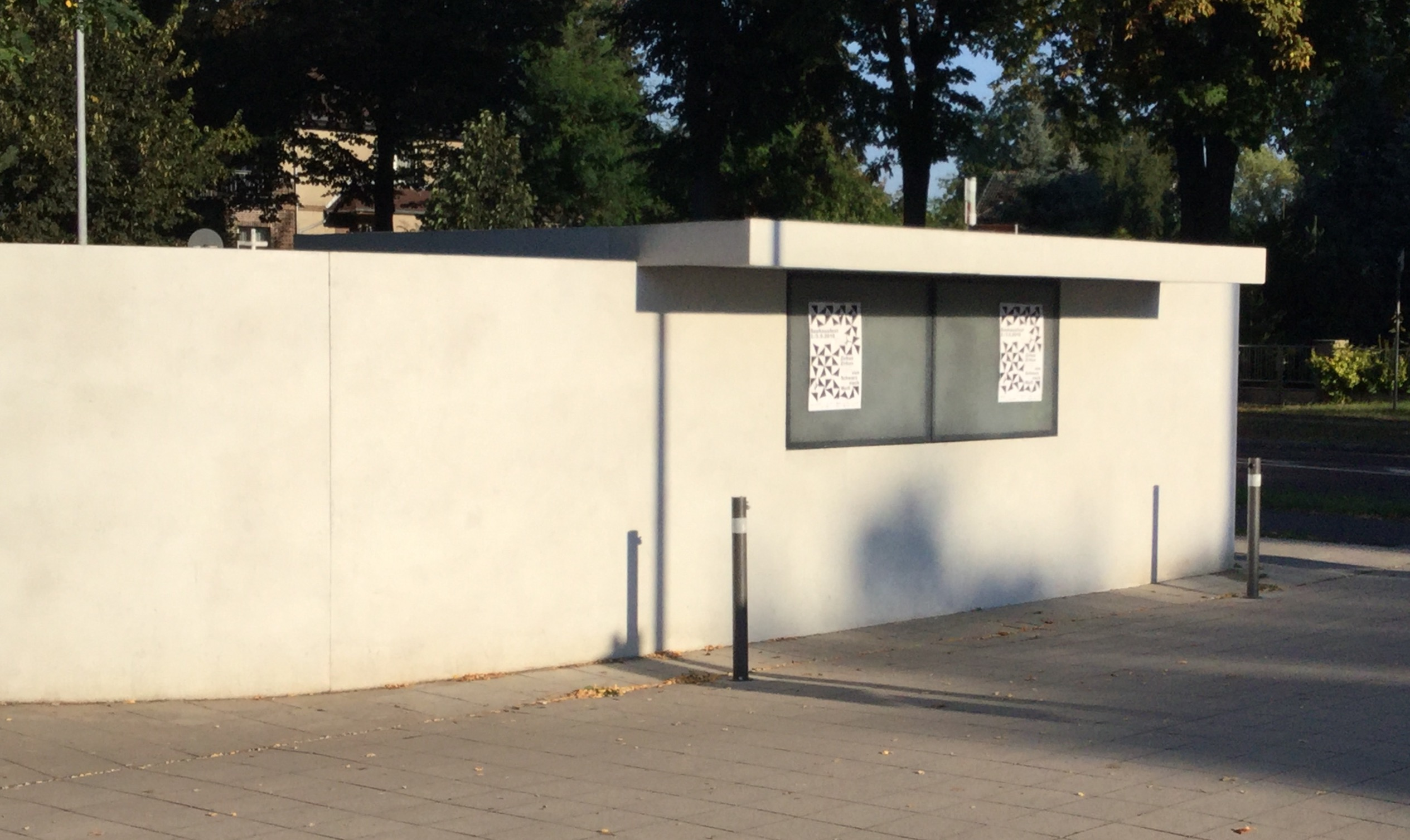 Trinkhalle Dessau